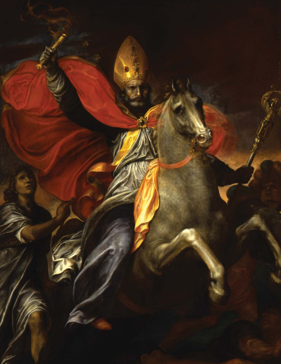 Sant'Ambrogio a cavallo scaccia gli ariani